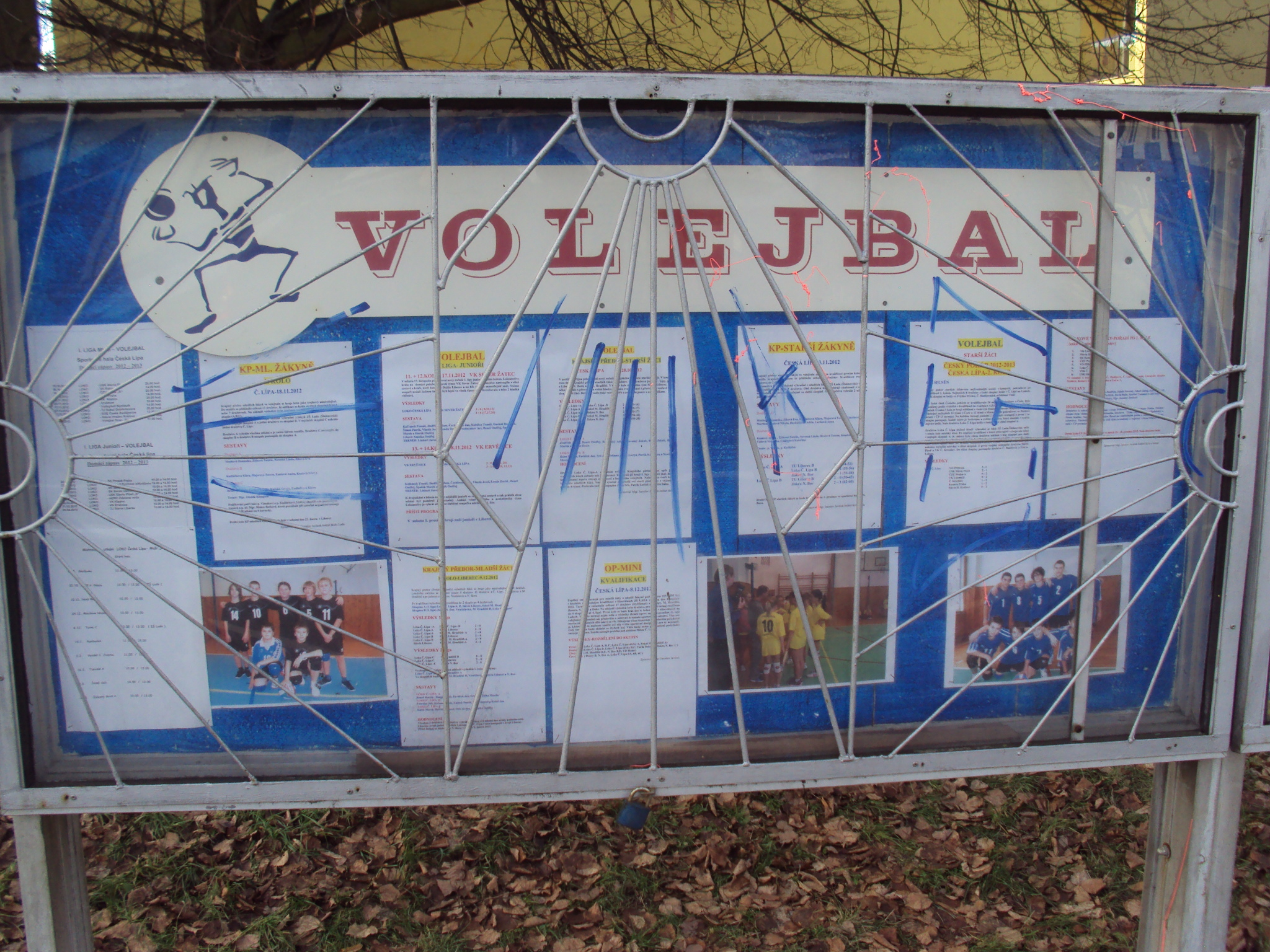 Vývěska TJ Lokomoiva Česká Lípa